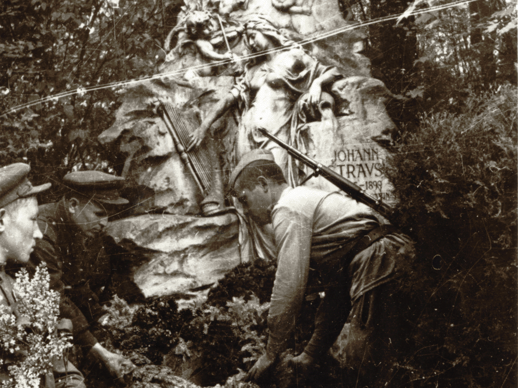 Мирные будни в послевоенной Вене